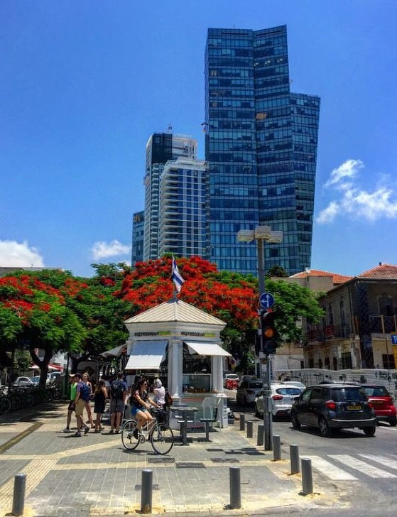 Quioscu a l'entamu del bulevar Rothschild, en Tel Aviv.